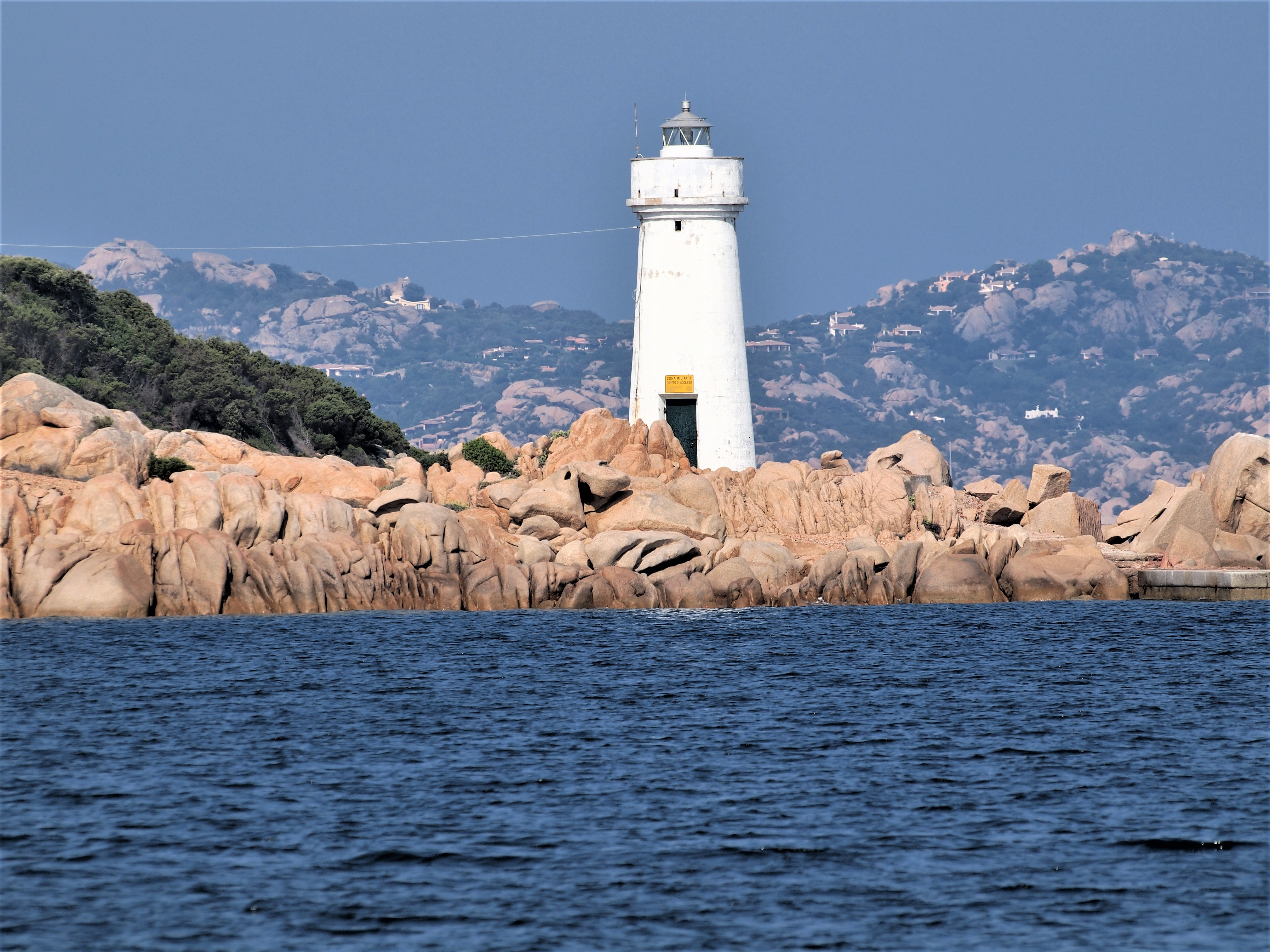 Leuchtturm am Capo d'Orso aus östlicher Sicht, Ostseite, Nord-Sardinien (41.177701N; 9.423351E)